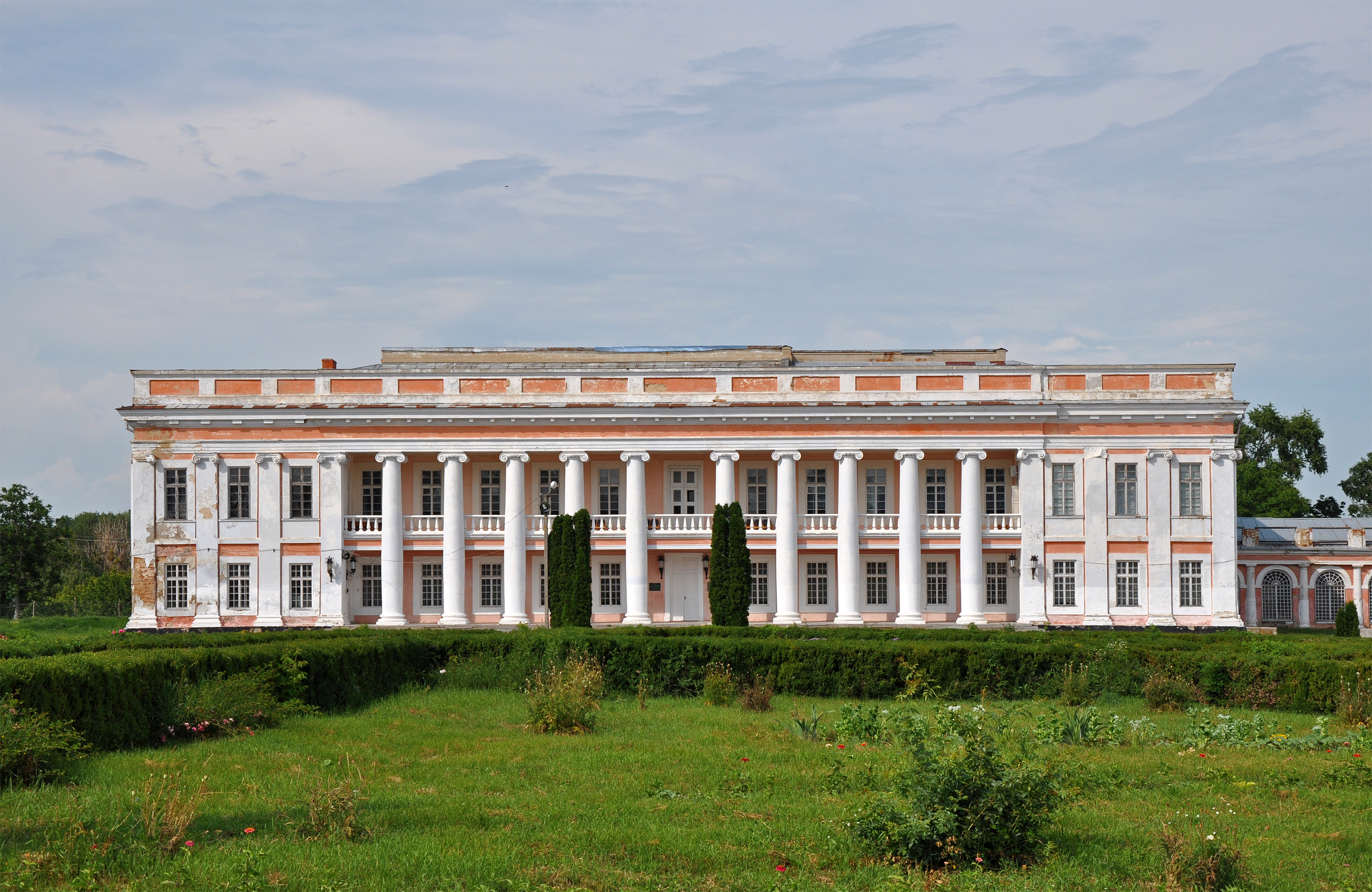 Старий палац (Потоцьких), Тульчин, вул. Незалежності,10